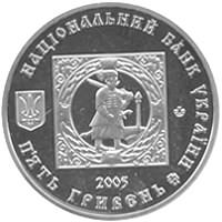 Монета Украины "500 лет казацким поселениям. Кальмиусская паланка"